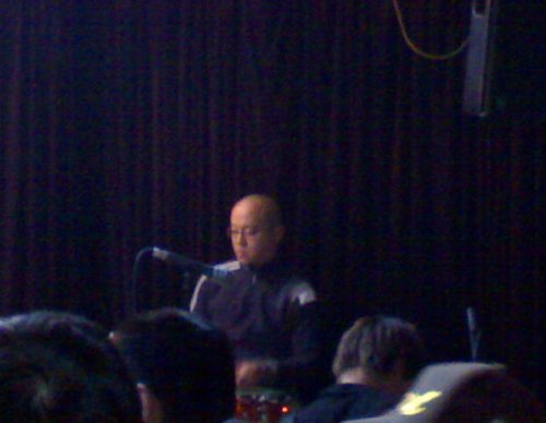 窦唯和不一样乐队演出